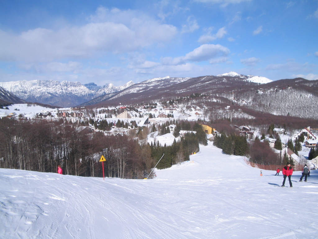 Impianti sciistici di Piancavallo-Aviano (PN)